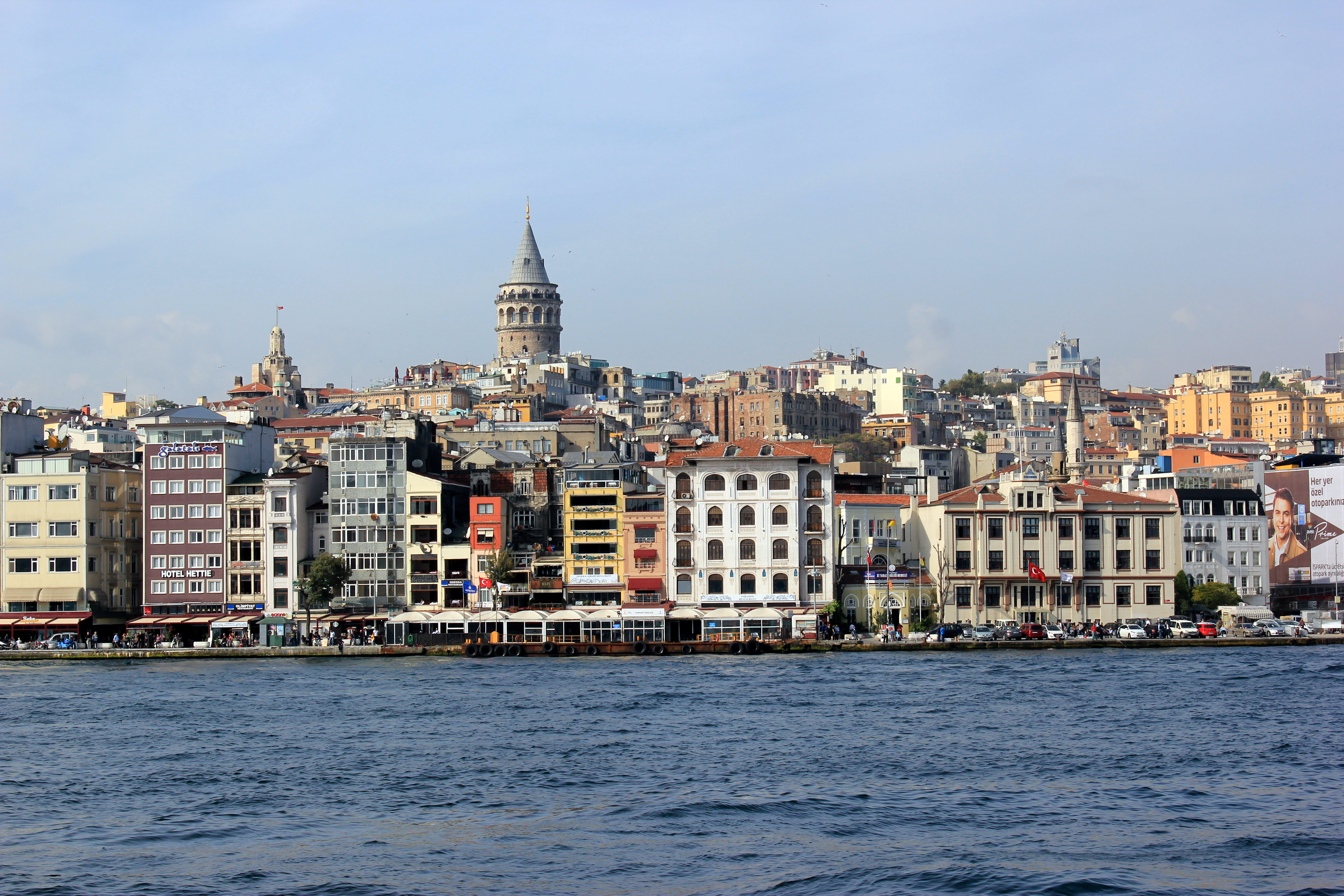 Blick auf den Stadtteil Karaköy mit dem Galataturm in Istanbul.